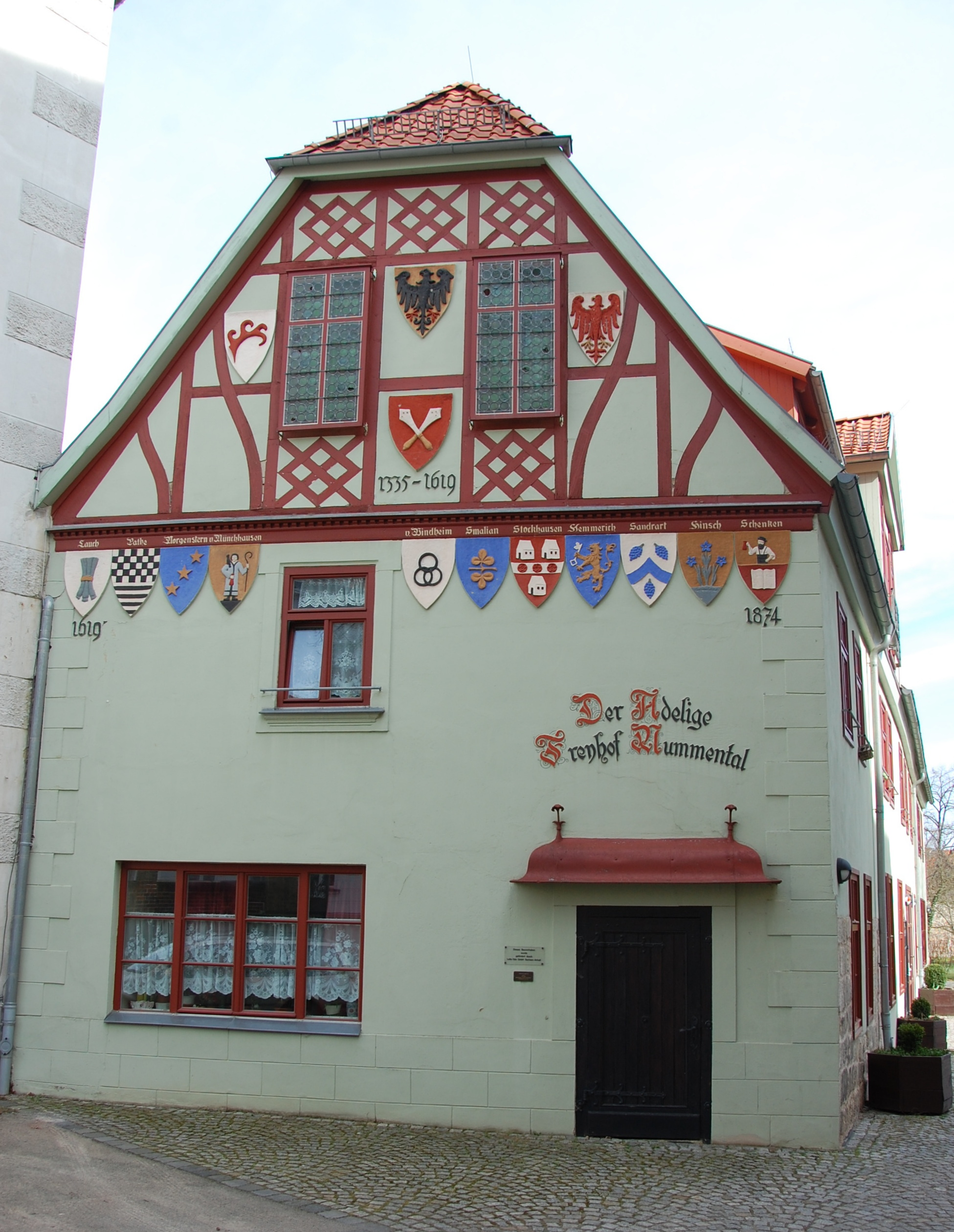 Haus Mummental 1a in Quedlinburg